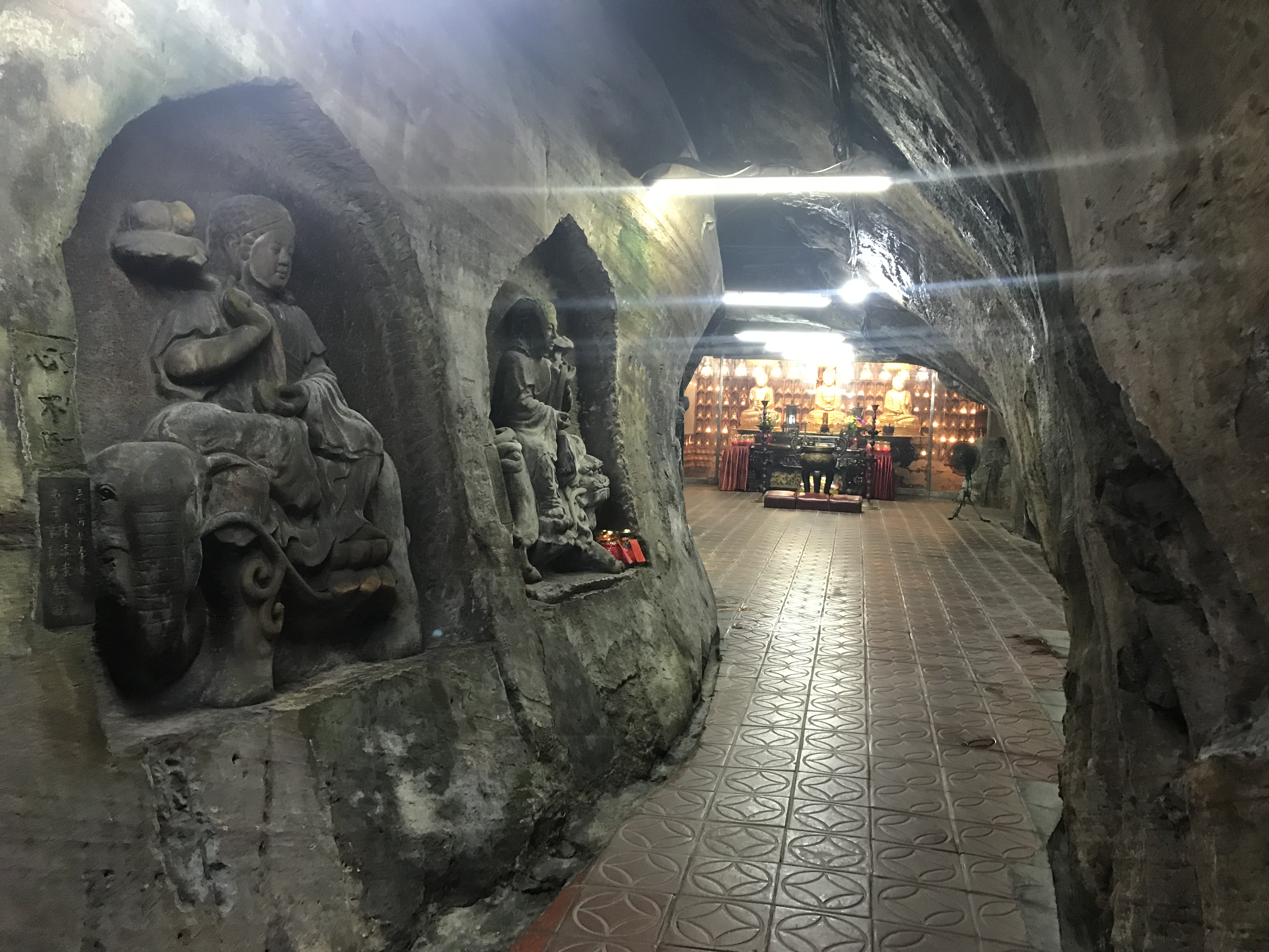 仙洞巖右洞入口